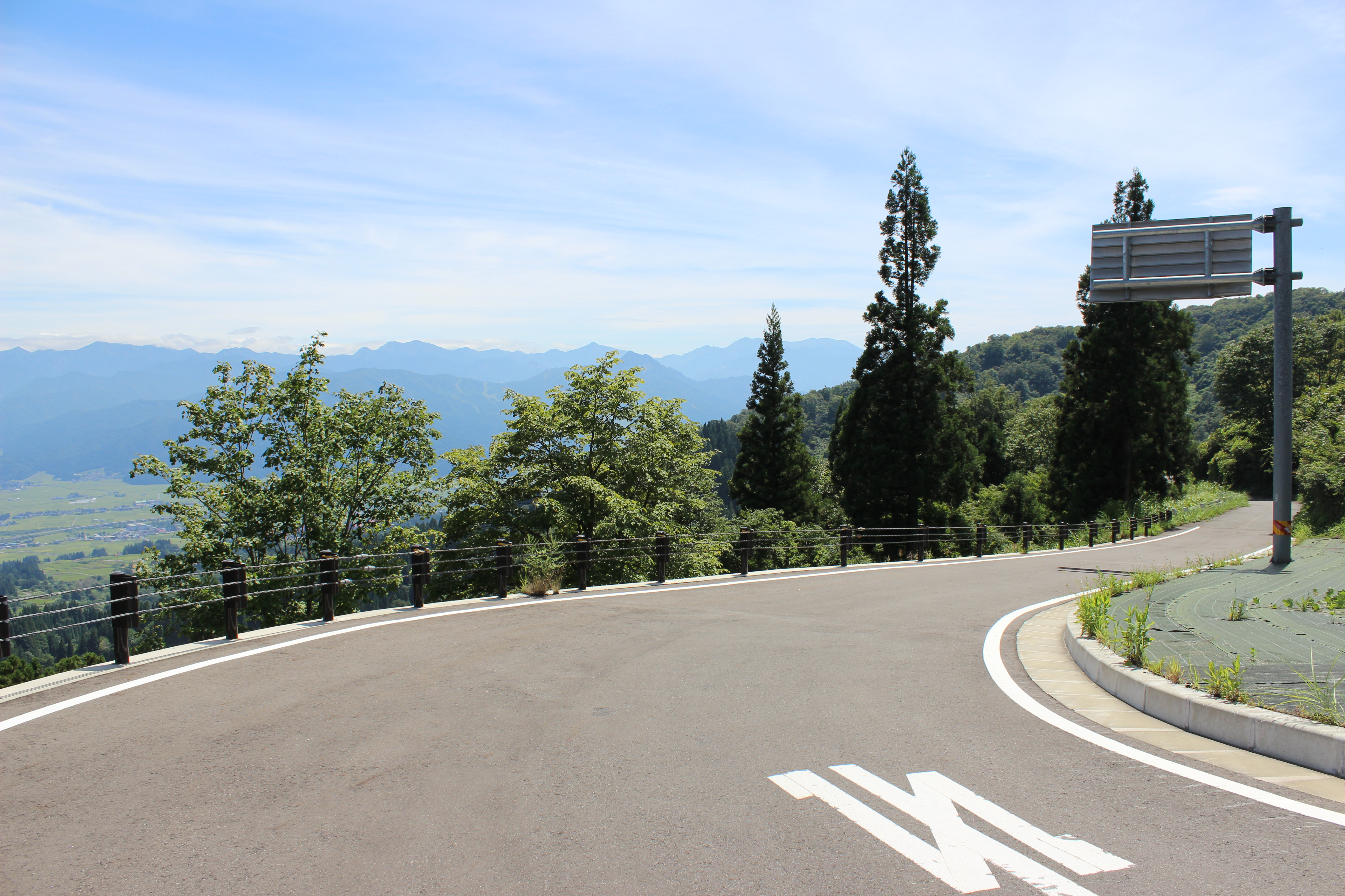 新潟県道82号十日町塩沢線の栃窪峠から見下ろす塩沢の町並み。